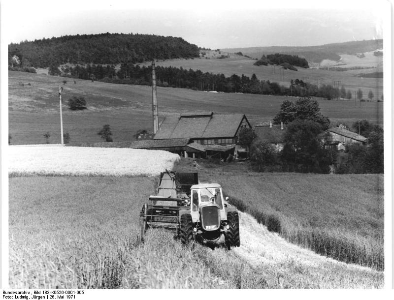 LPG Griesheim, Grünfutterernte Zentralbild Ludwig-26.5.71-ch-Bezirk Erfurt: Ernte des Futterroggens in der Kooperationsgemeinschaft Griesheim. Kreis Arnstadt. In zwei neunstündigen Schichten nutzen die Genossenschaftsbauern der sieben in der KOG zusammenarbeitenden Genossenschaften die Technik bei der Grünfutterernte - unser Foto zeigt einen "D4K"-Traktor im Einsatz. Bei hochsommerlichen Temperaturen ernten die Genossenschaftsbauern verlustarm den Futterroggen und schaffen so eine Grundlage für eine Stabile Milchproduktion. Die abgeernteten Flächen werden mit Markstammkohl bestellt.